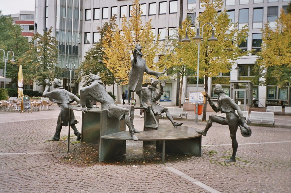 Szene aus der "Jobsiade" vor dem Bochumer Amtsgericht